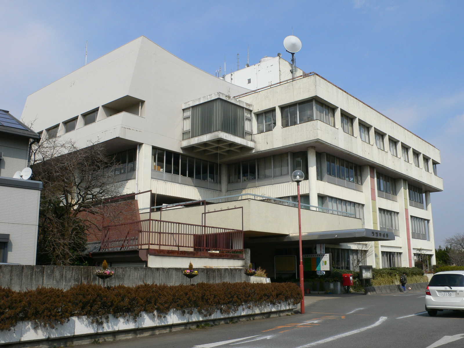 Kiyose_city_hall (Kiyose, Tokyo)